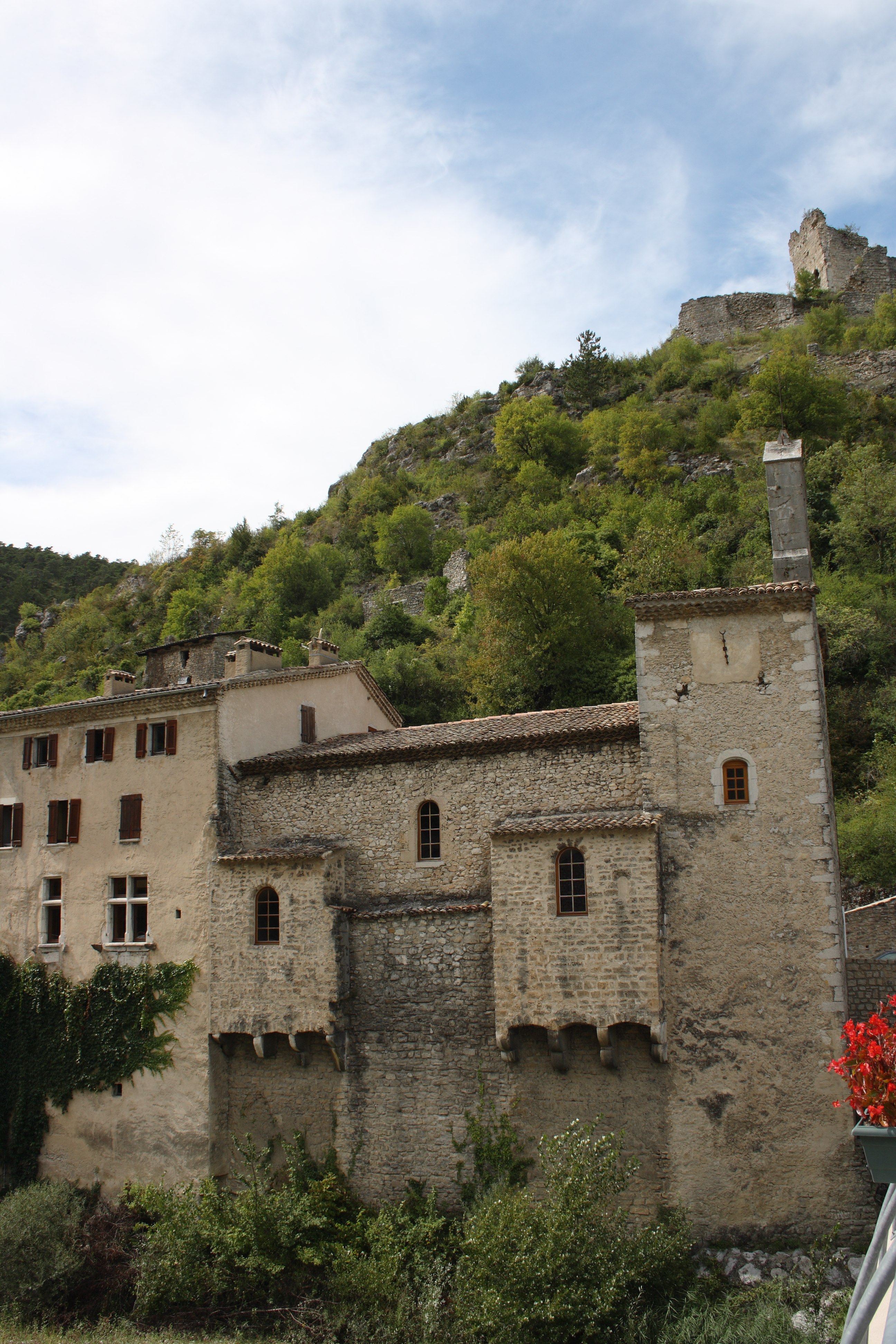 evangelische Kirche (Temple) in Pontaix